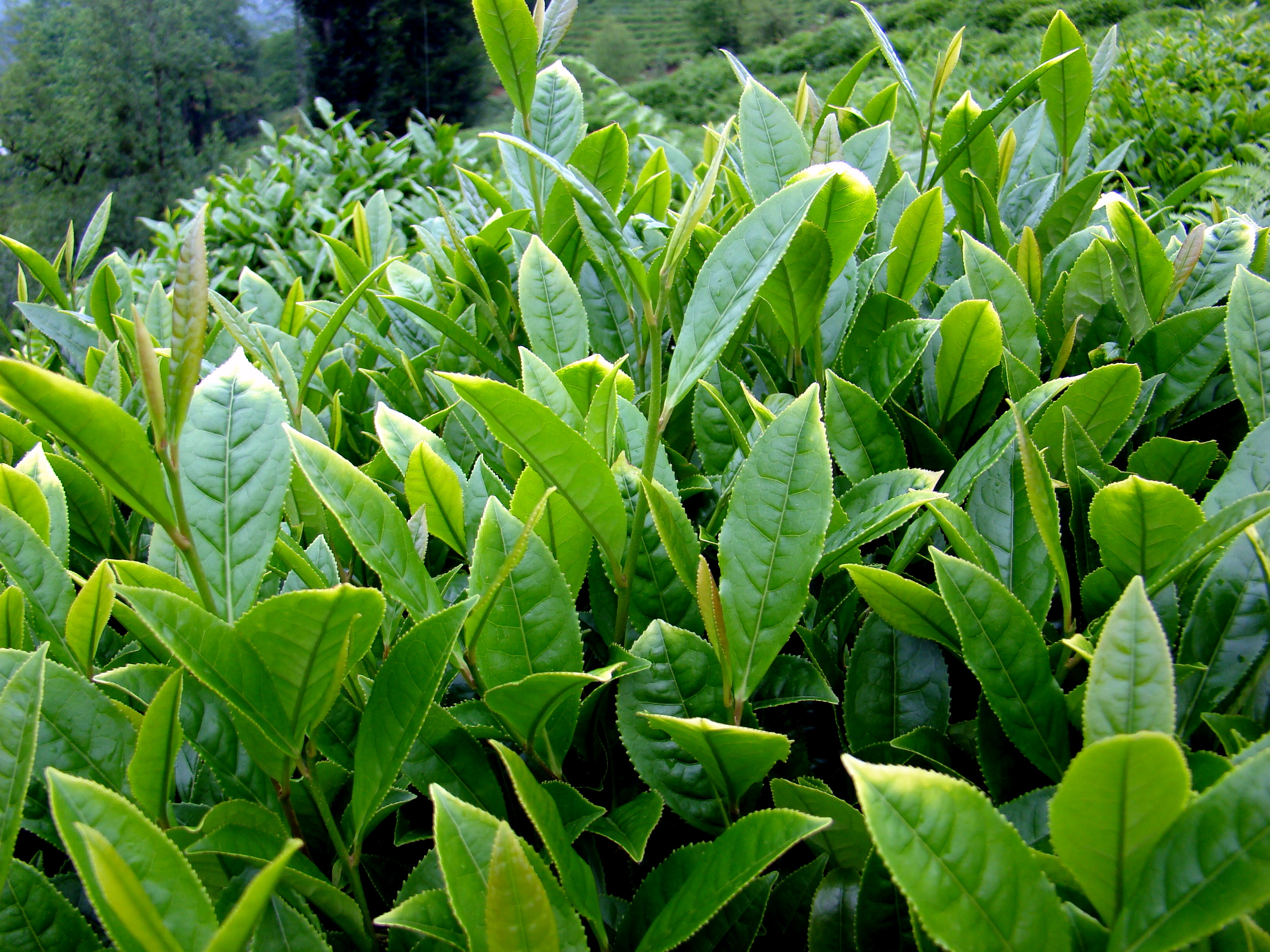 Camellia sinensis